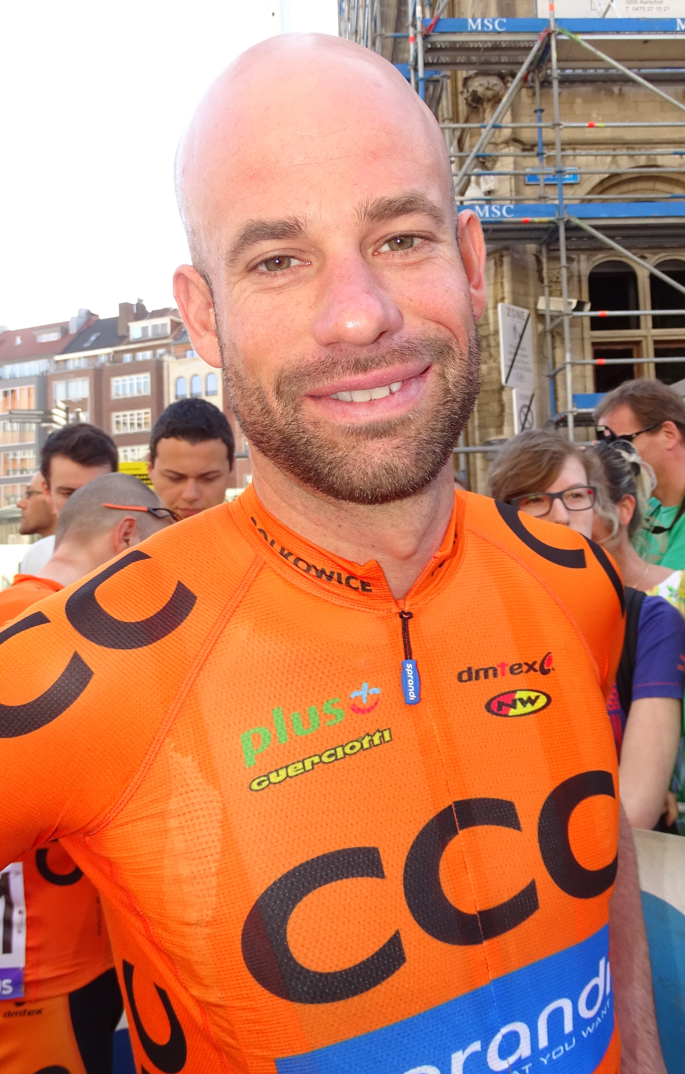 Reportage réalisé le mercredi 15 avril à l'occasion du départ de la Flèche brabançonne 2015 à Louvain, Belgique.